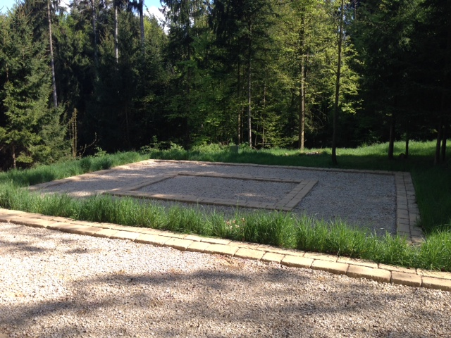 Petinesca